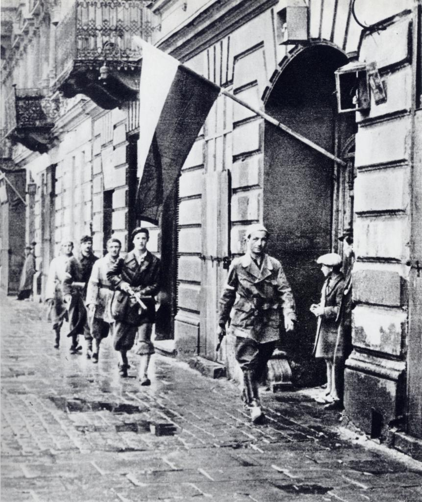 Pierwsze dni sierpnia 1944. Patrol porucznika Stanisława Jankowskiego "Agatona" z batalionu "Pięść" na pl. Kazimierza Wielkiego w drodze na dalekie rozpoznanie do Śródmieścia. Po prawej kolejno kamienice pl. Kazimierza Wielkiego 8 i 10. Idą od prawej: Stanisław Jankowski ps. Agaton, Witold Abrożewicz ps. Witek, Kazimierz M. Piechotka ps. Jacek, Leon Putowski ps. Pakulski i Wojciech Bernatowicz ps. Marek. Opis sytuacji, w jakiej wykonano zdjęcie, znajduje się w książce: S. Jankowski „Agaton”, Z fałszywym ausweisem... Tom 2, s. 231. Nazwiska osób: na podstawie podpisu pod fotografią między s. 224 i 225. Uwaga, z treści książki S. Jankowskiego wynika, że fotografia została wykonana po 1 sierpnia 1944.